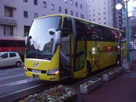 ツアーバス時代のオリオンバス、天領バス所有車両。